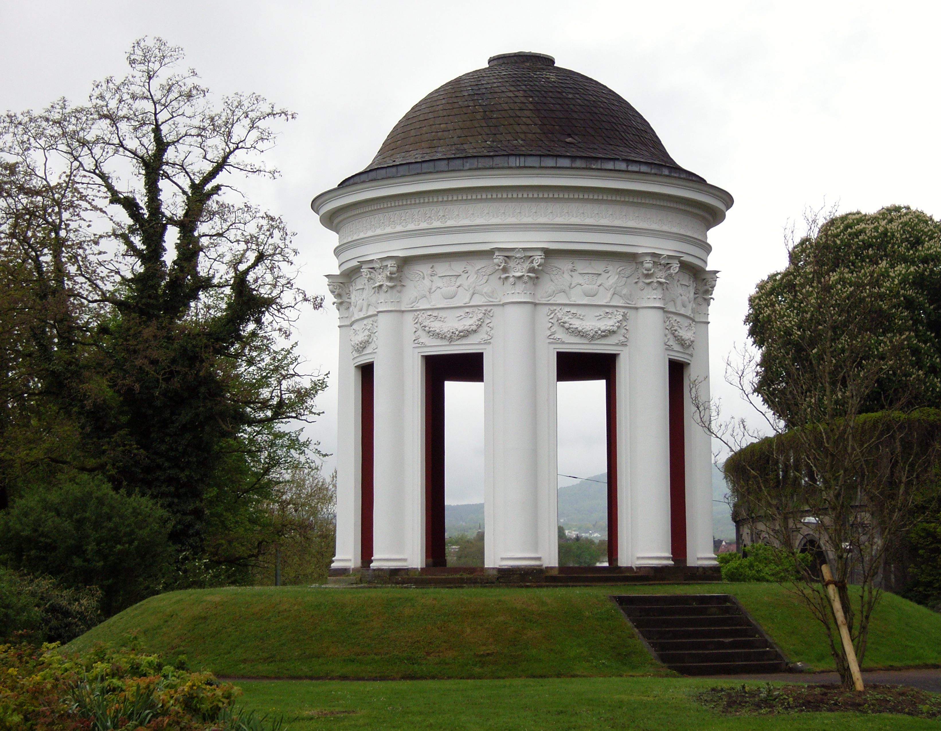 Der Frühstückstempel am Weinberg in Kassel. Erbaut in der ersten Hälfte des 19. Jahrhunderts von Daniel Engelhard